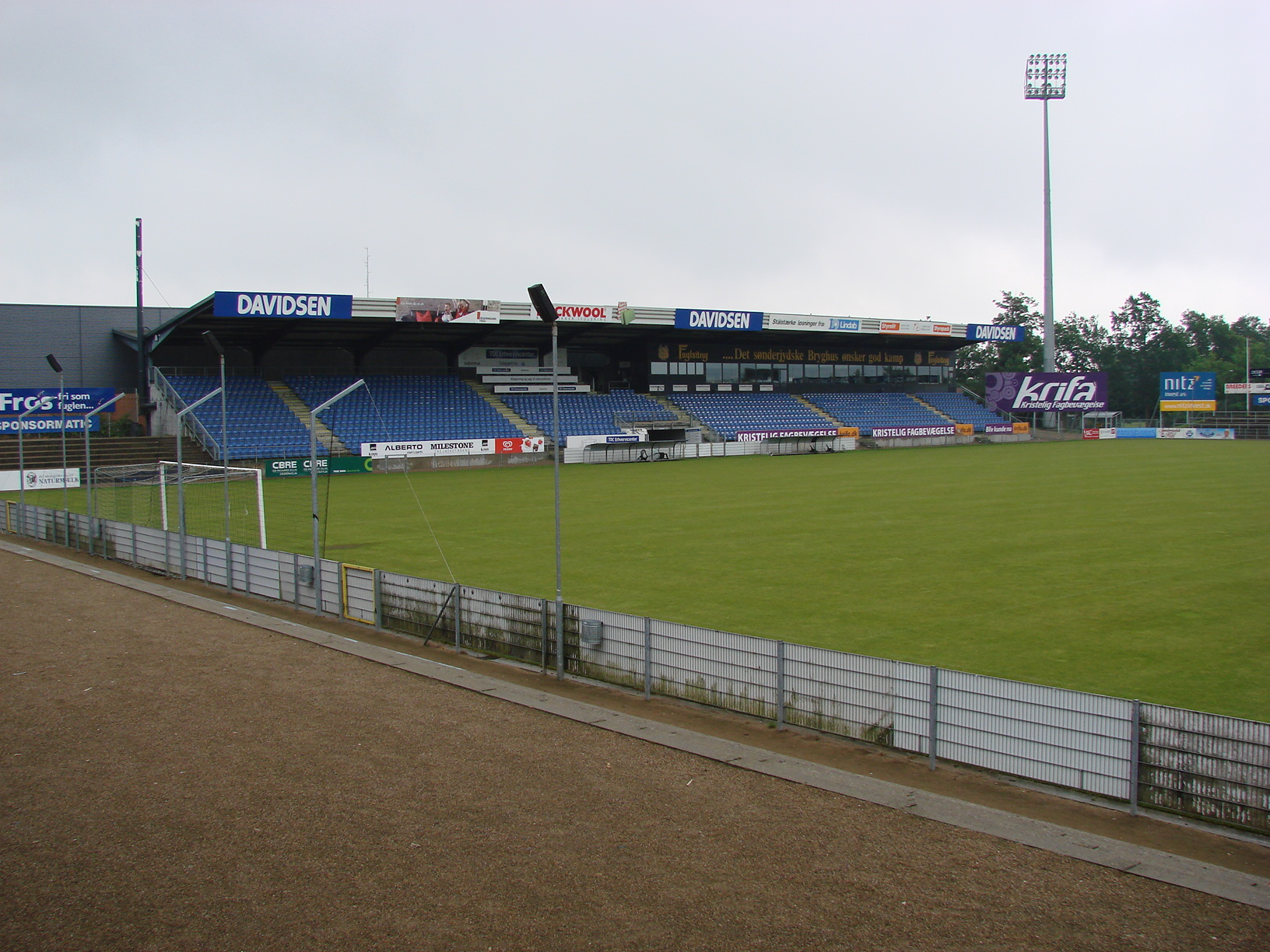 SønderjyskE